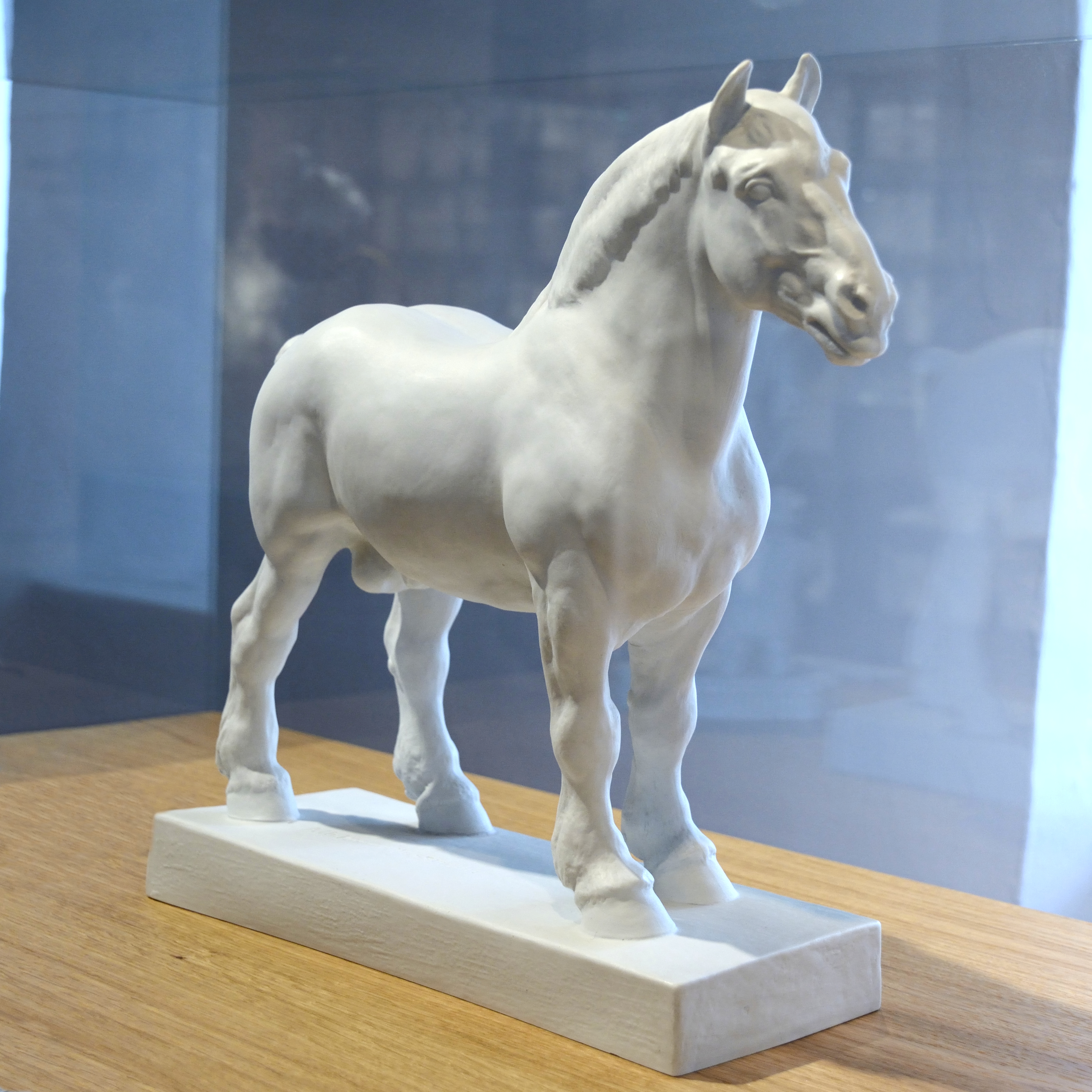 Der Kaltblut-Hengst "Gauherr" als Skulptur von Albert Hinrich Hussmann im Museum Schloss Fürstenberg. Siehe dazu auch die "Sonderschau "Pferde in Porzellan" im Schloss" [1].